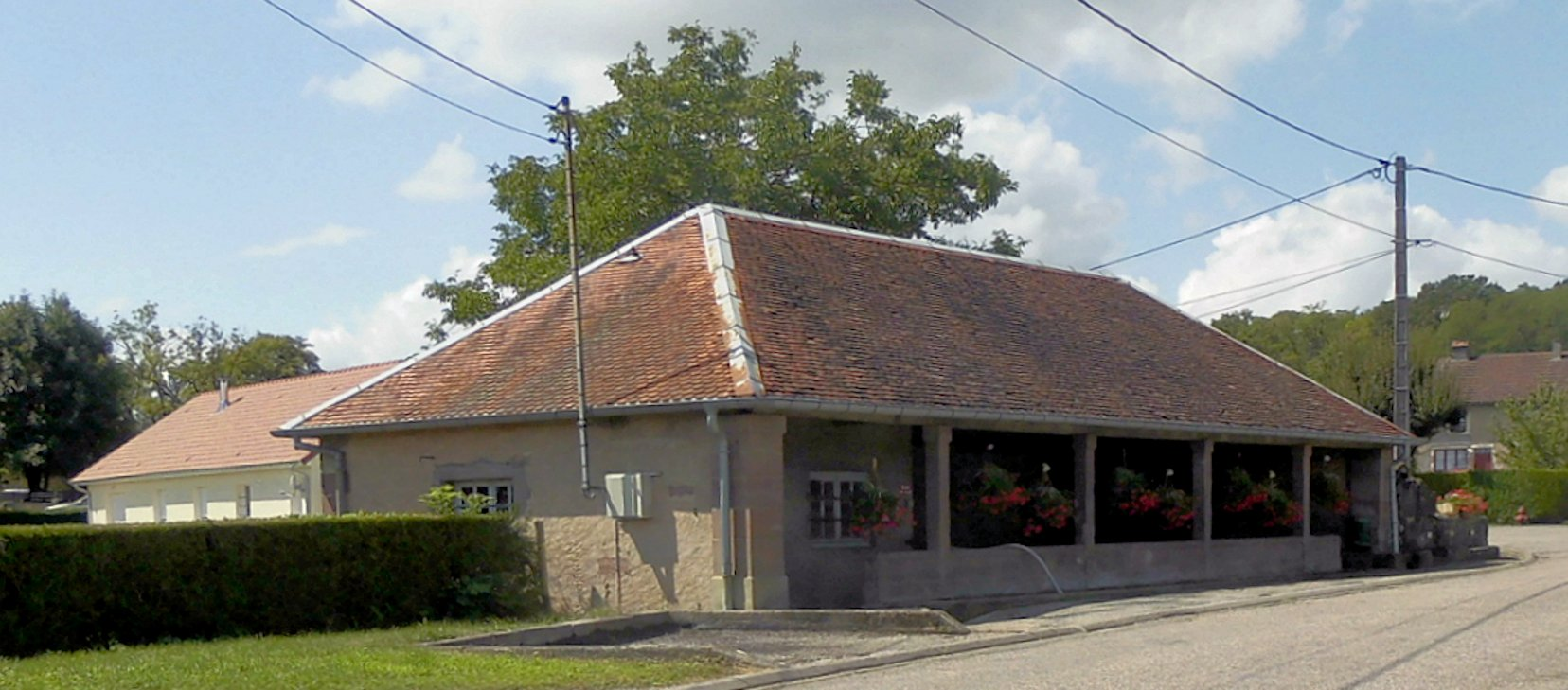 Lavoir à Polaincourt, commune de Polaincourt-et-Clairefontaine